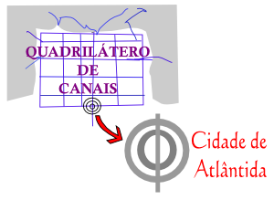 Quadrilátero